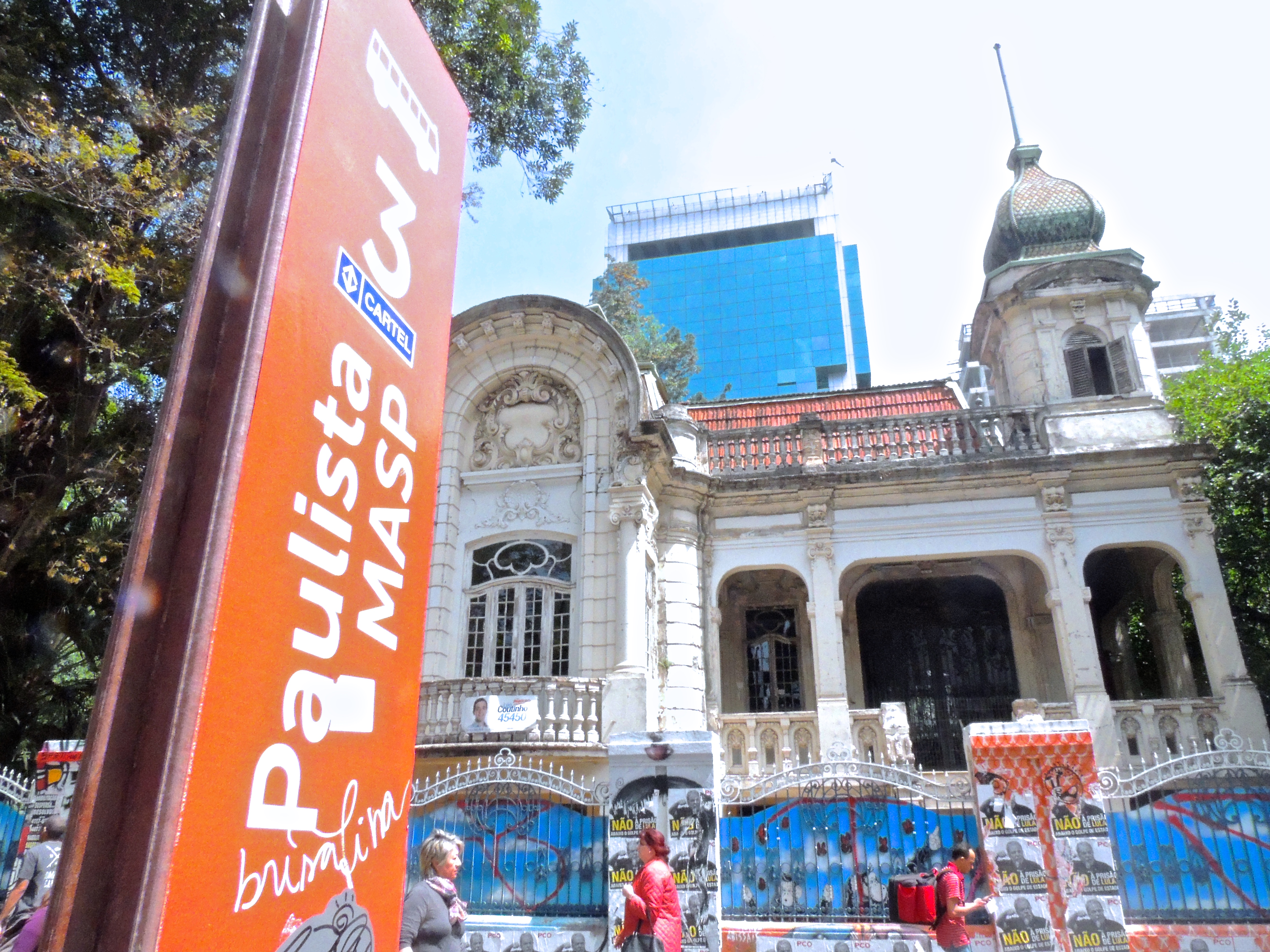 Faixada da residência Joaquim Franco de Melo, na avenida Paulista, São Paulo (SP), Brasil, com o ponto de parada da linha circular turismo da cidade de São Paulo.